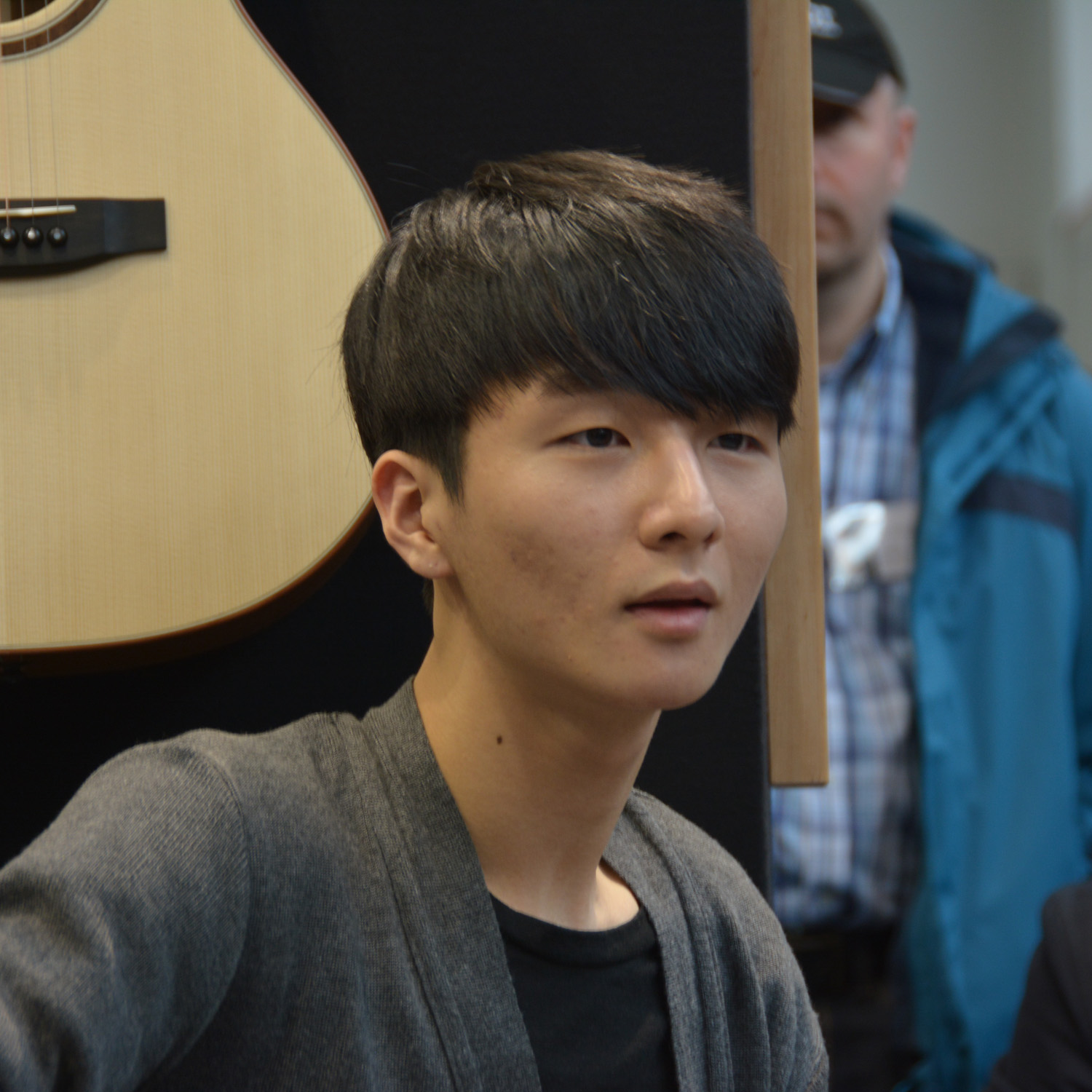 Sungha Jung von nahem auf der Musikmesse Frankfurt am Stand von Lakewood Guitars